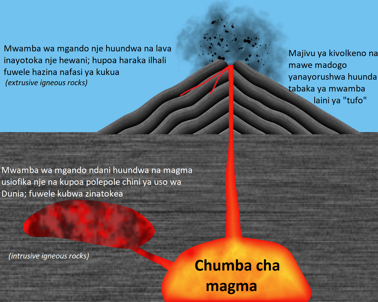 Kiswahili: Picha inaeleza jinsi gani magma inaganda na kuunda miamba a) juu ya uso wa dunia (miamba ya mgando nje - extrusive rocks) b) chini ya uso wa Dunia (miamba ya mgando ndani - intrusive rocks)